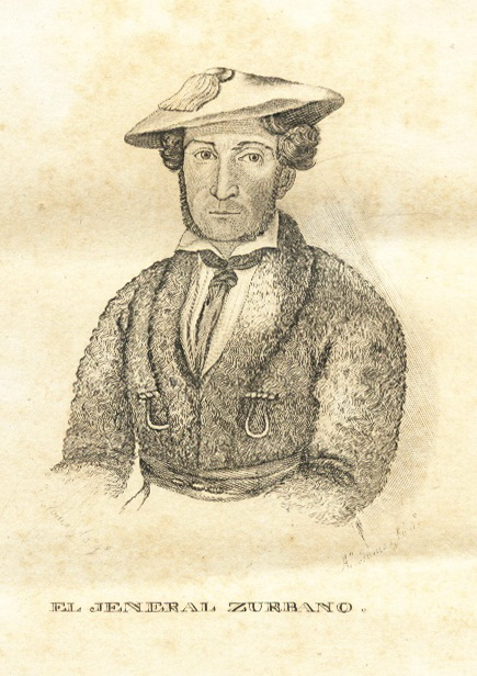 Martín Zurbano. "Historia de la vida militar y política de D. Martin Zurbano". Por una sociedad de patriotas. Madrid 1845.